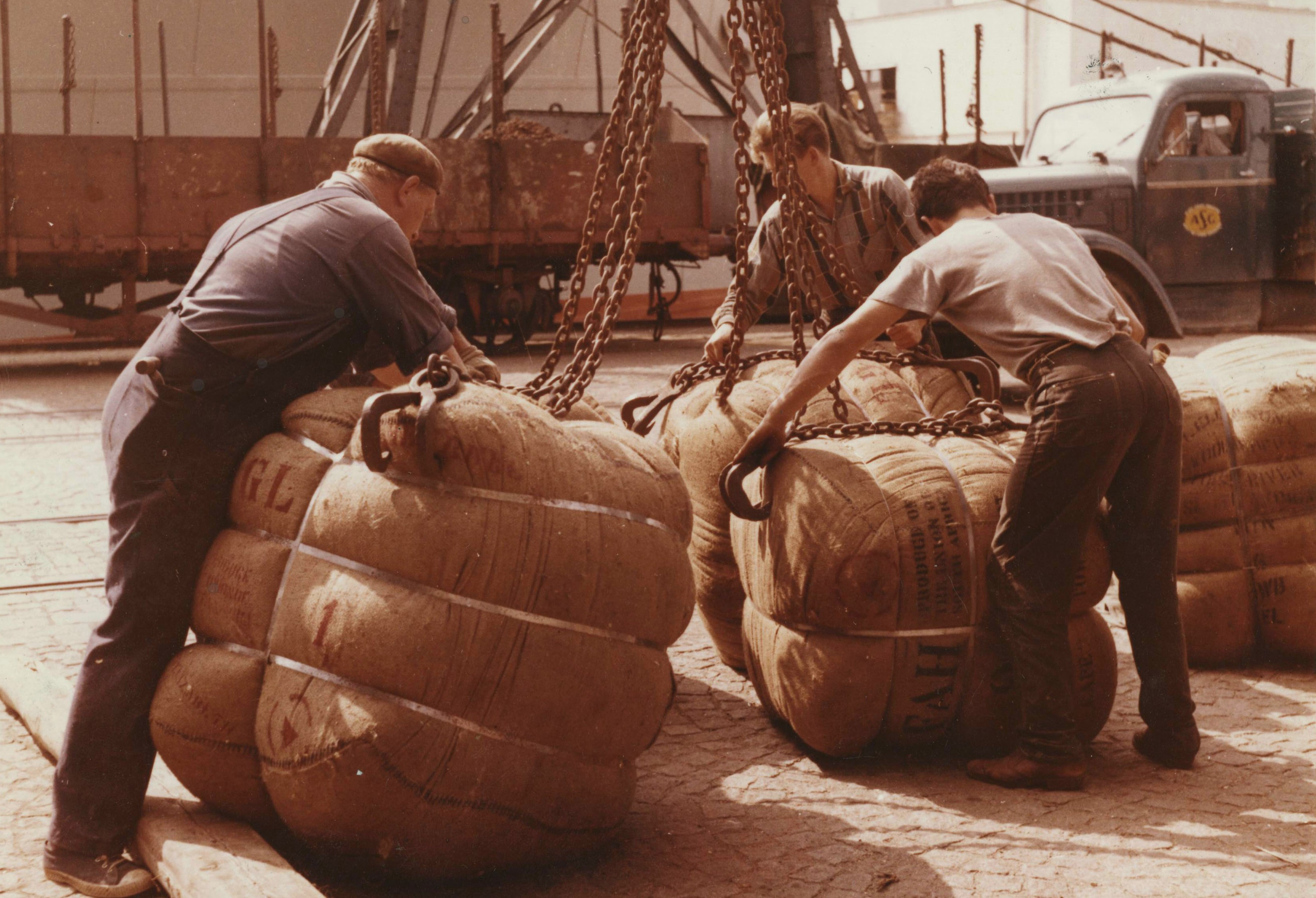 Stockholms Frihamn: Sjåare i arbete.